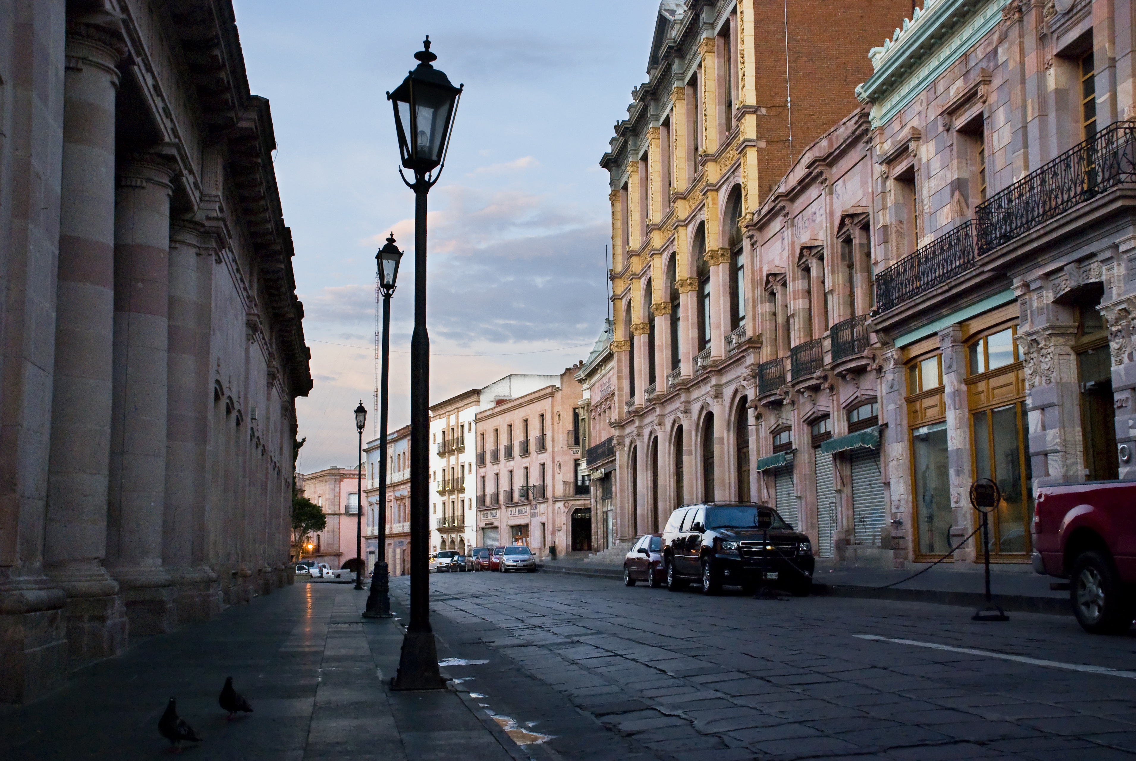 Aqui sin el pesado tráfico que Sarihuella observó.